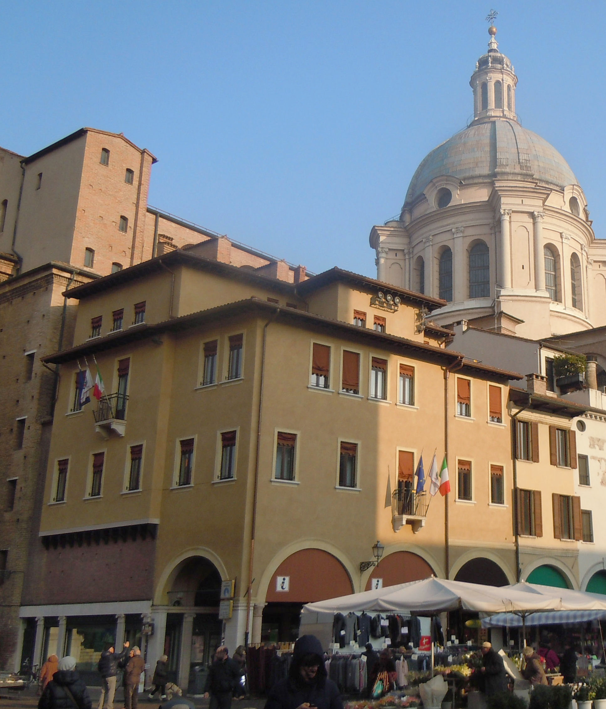 Mantova, Palazzo della Cervetta in Piazza delle Erbe.